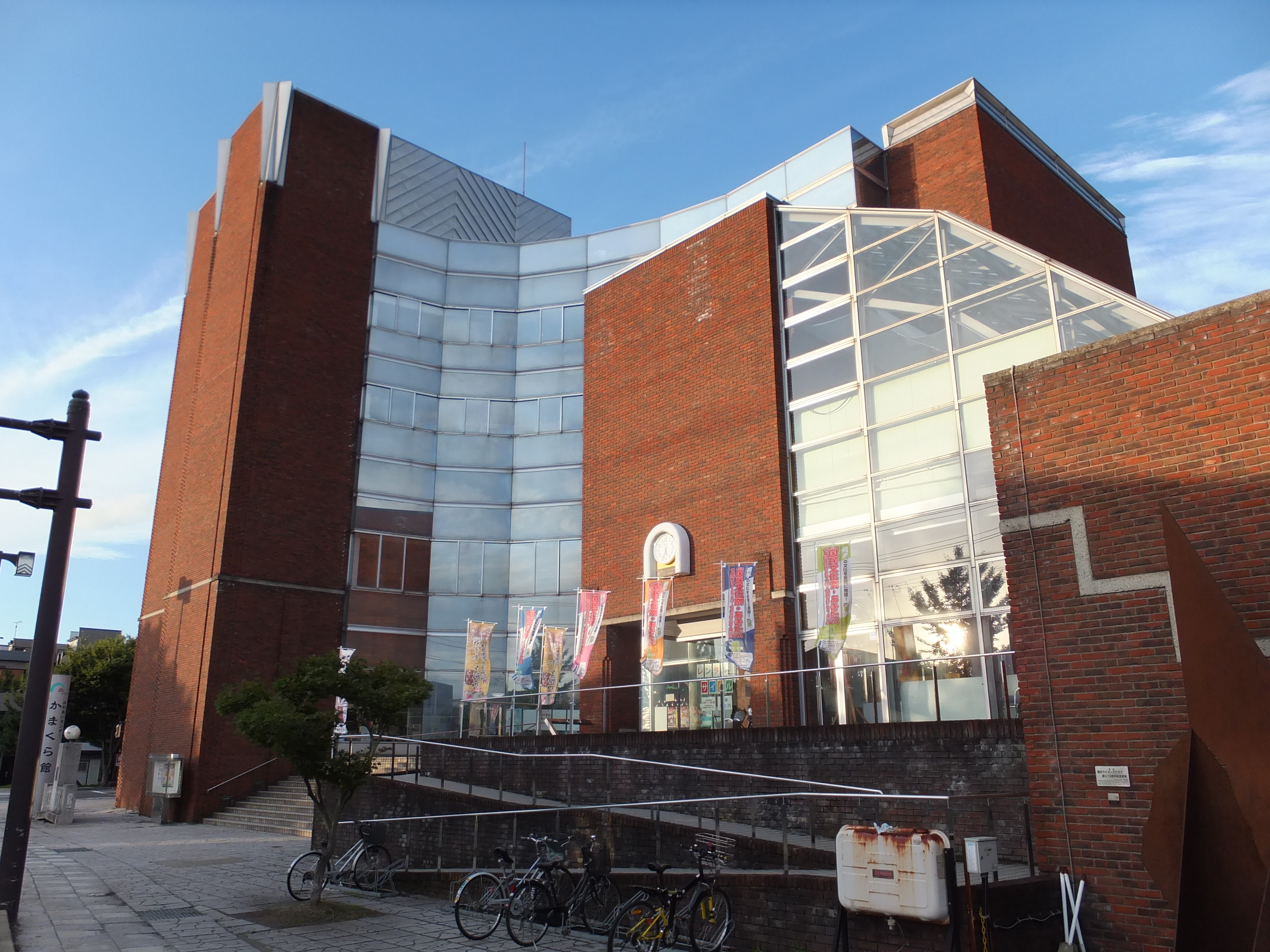 横手市かまくら館